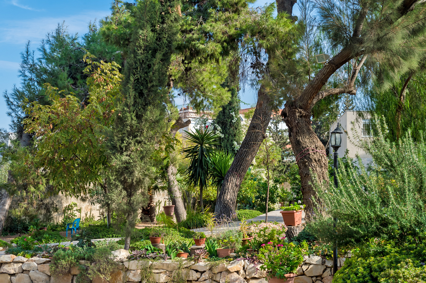 Русское подворье в Вифании. Деревья